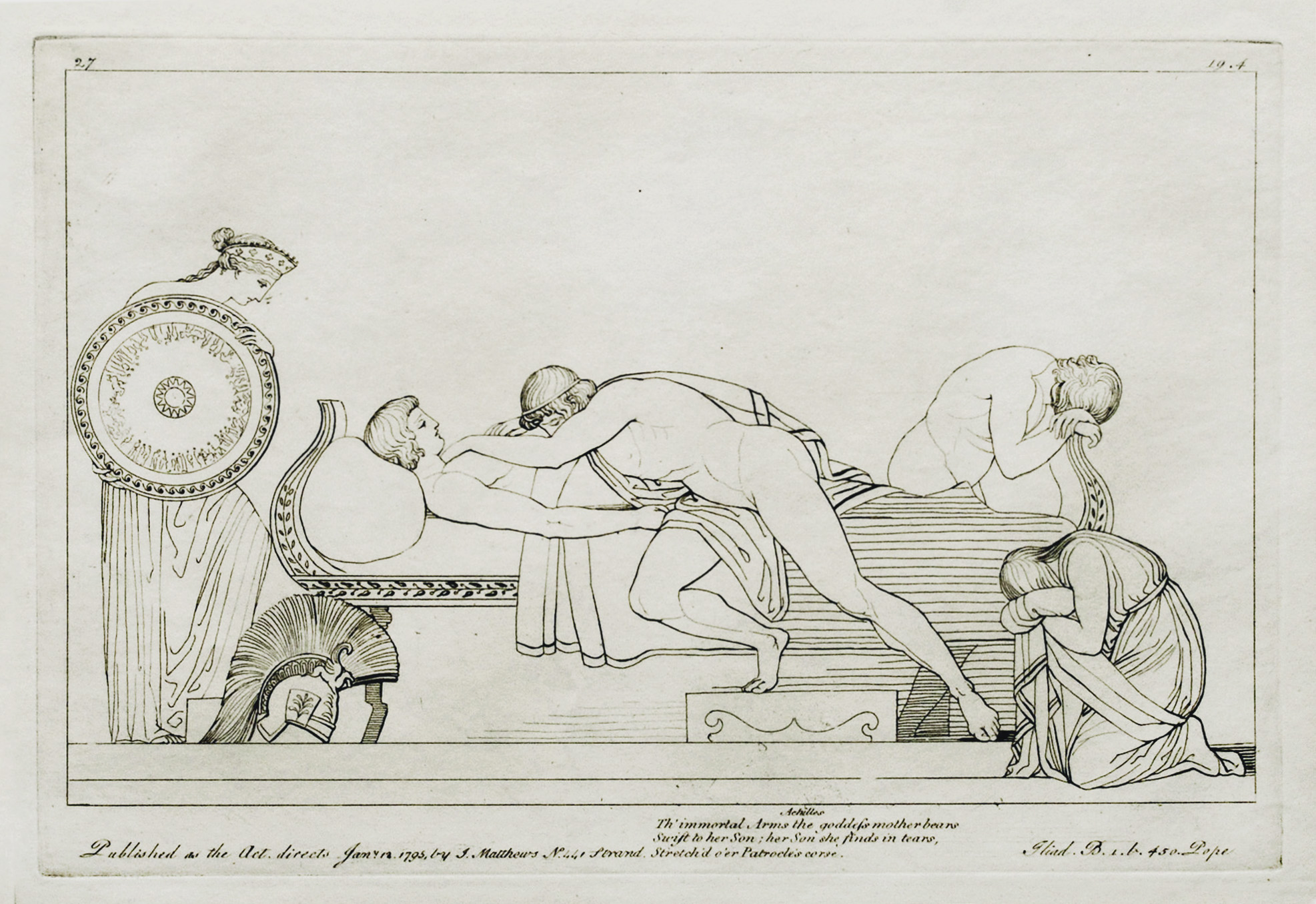 Kupferstich (1795) von Tommaso Piroli (1752 – 1824) nach einer Zeichnung (1793) von John Flaxman (1755 – 1826).